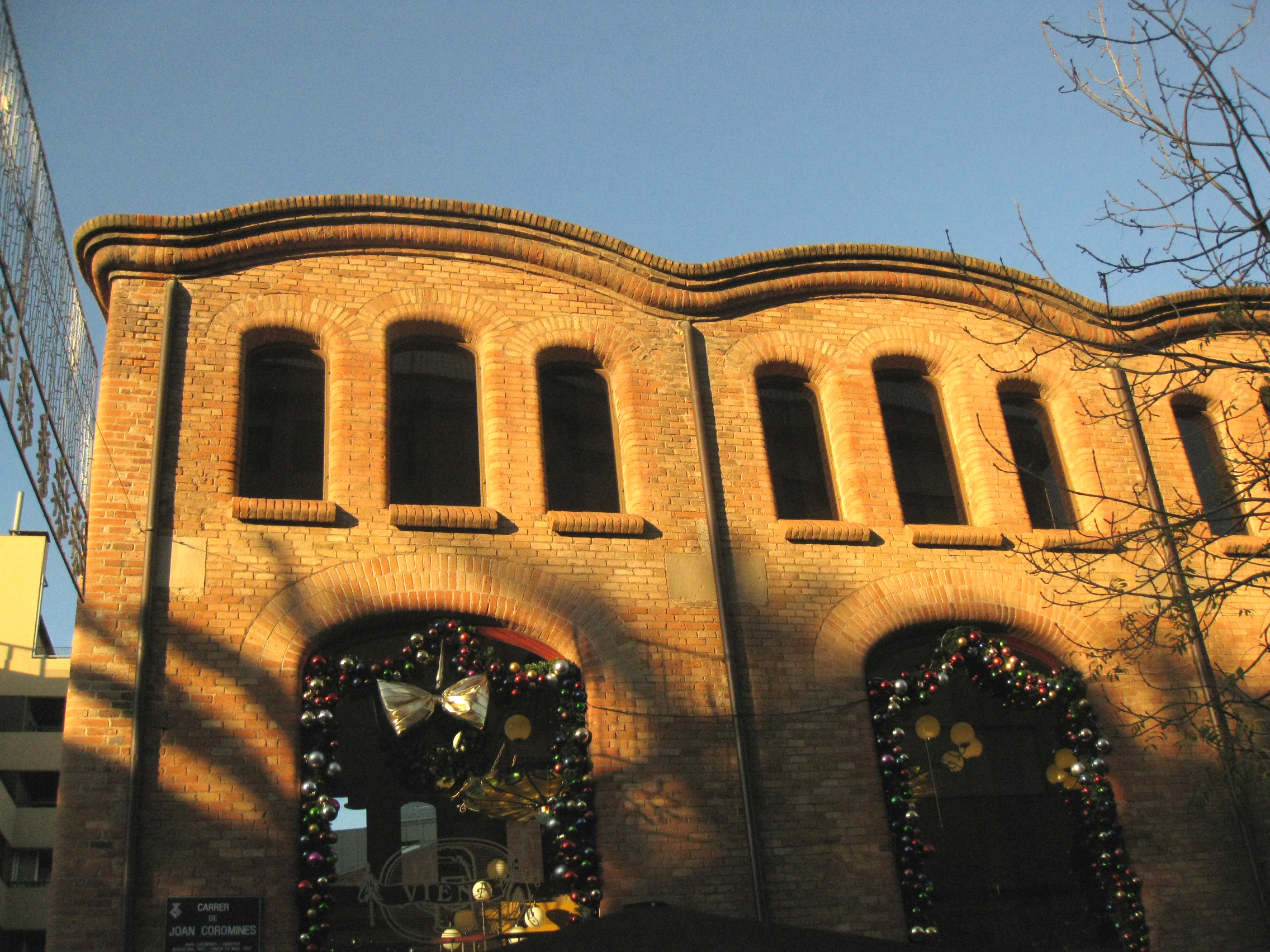 Societat General d'Electricitat, edifici de Lluís Muncunill del 1908 al carrer de la Unió, cantonada amb Joan Coromines, amb guarniments de Nadal. Actualment hi ha un restaurant. Detall de la façana del carrer de Joan Coromines.